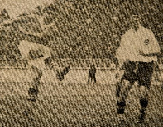 Partida entre o Palestra Itália e o Corinthians que contou com a goleada da equipe alviverde por 8 a 0 em 1933.